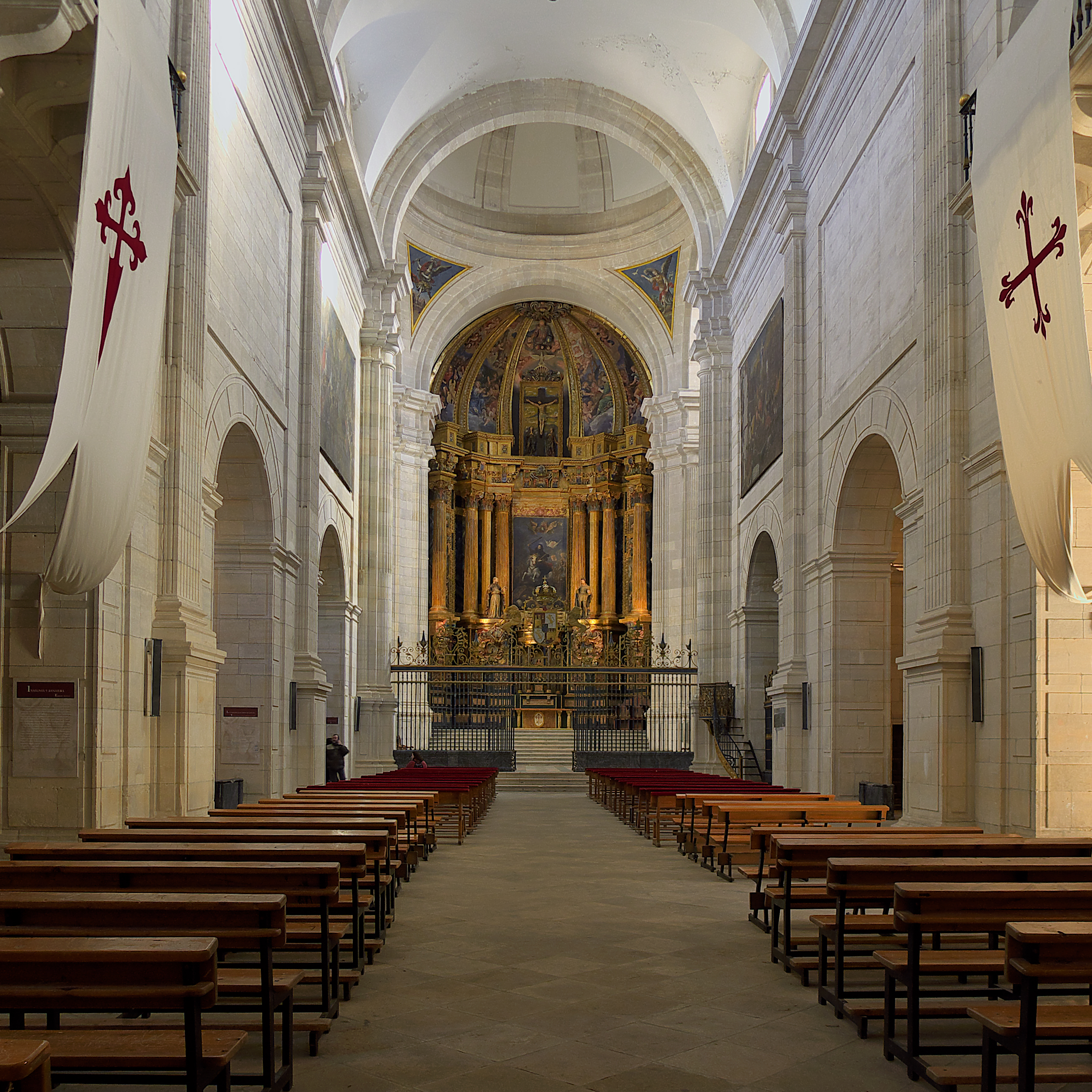 El conquense Francisco de Mora, en plena madurez artística, construye el magnífico edificio, del total agrado de Felipe II (1598). En la construcción de la iglesia trabajó como cantero de Francisco de Luna, suegro de Andrés de Vandelvira.